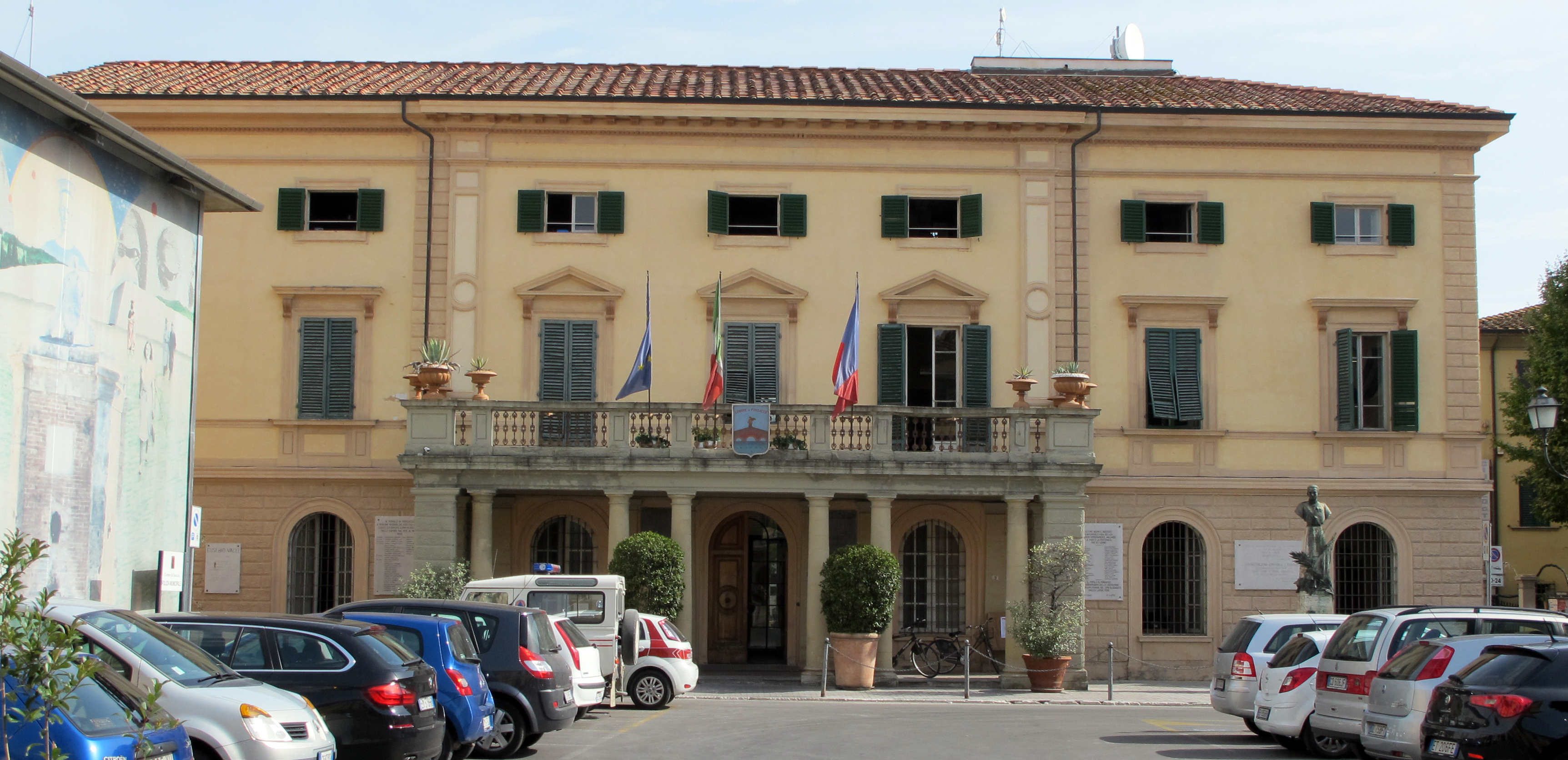 Ponsacco